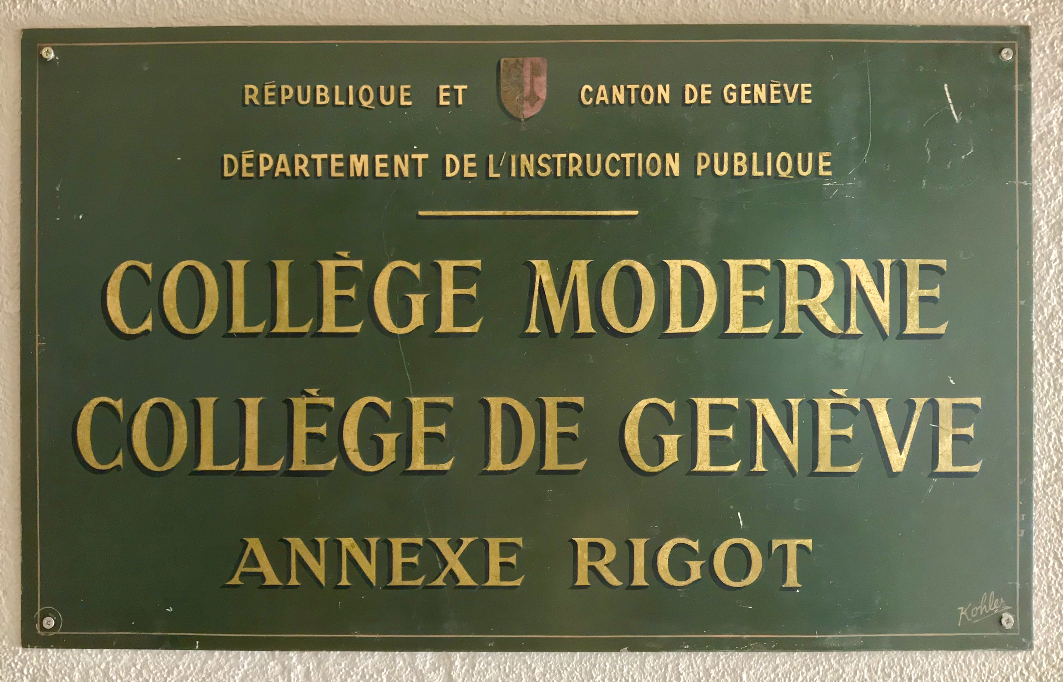 Ancien panneau du collège Sismondi : "Collège Moderne, Collège de Genève : Annexe Rigot".